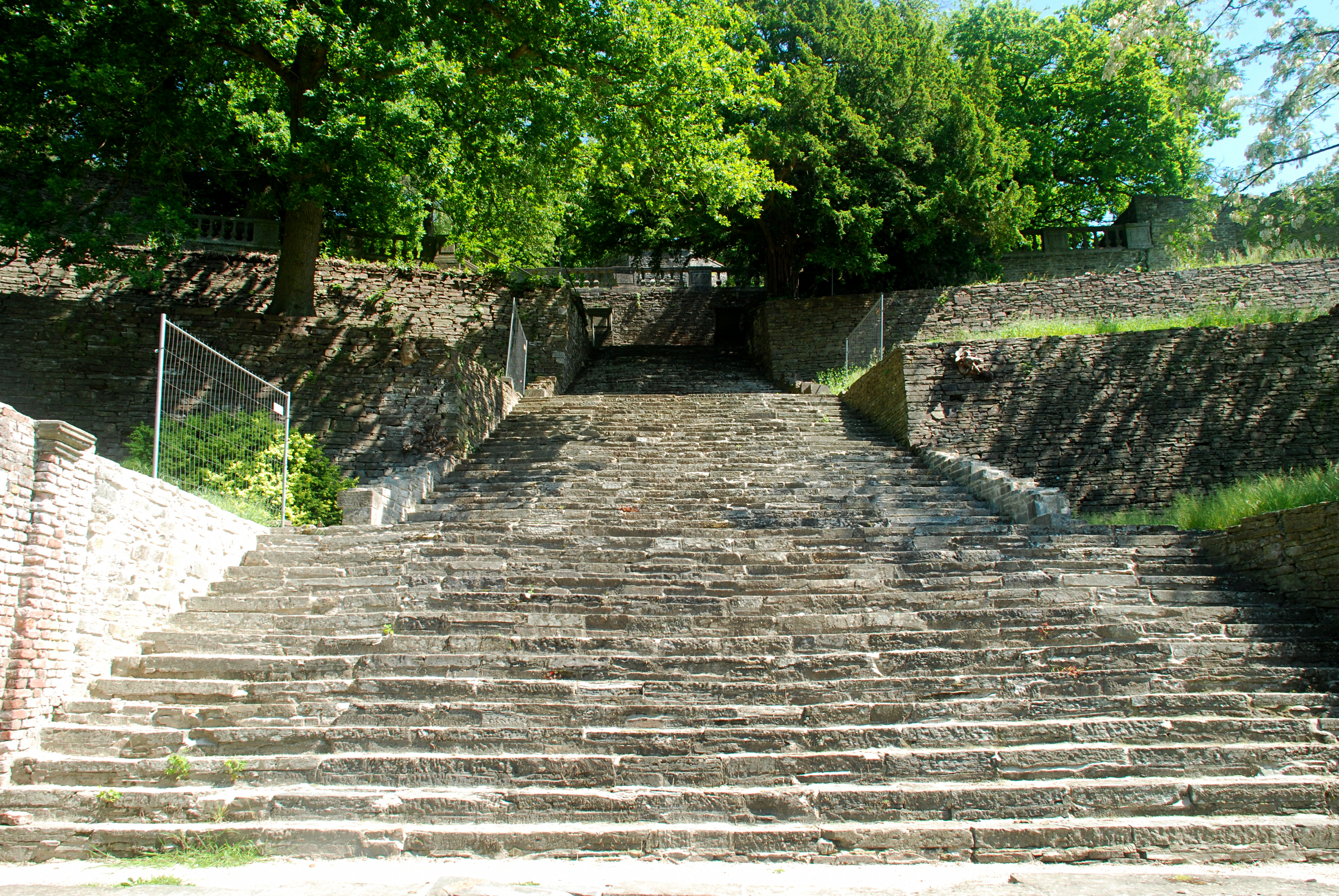 Belgique - Brabant wallon - Villers-la-Ville - Escalier menant à la chapelle Notre-Dame de Montaigu